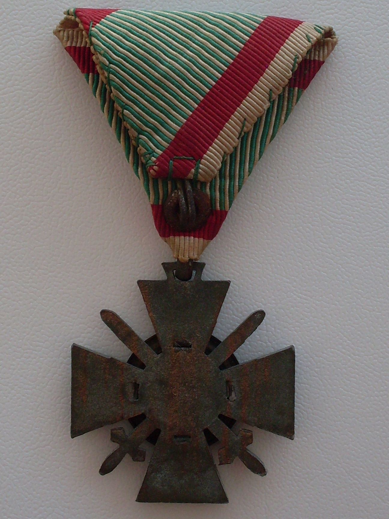 Ungarisches Frontkämpferkreuz (Rückseite)